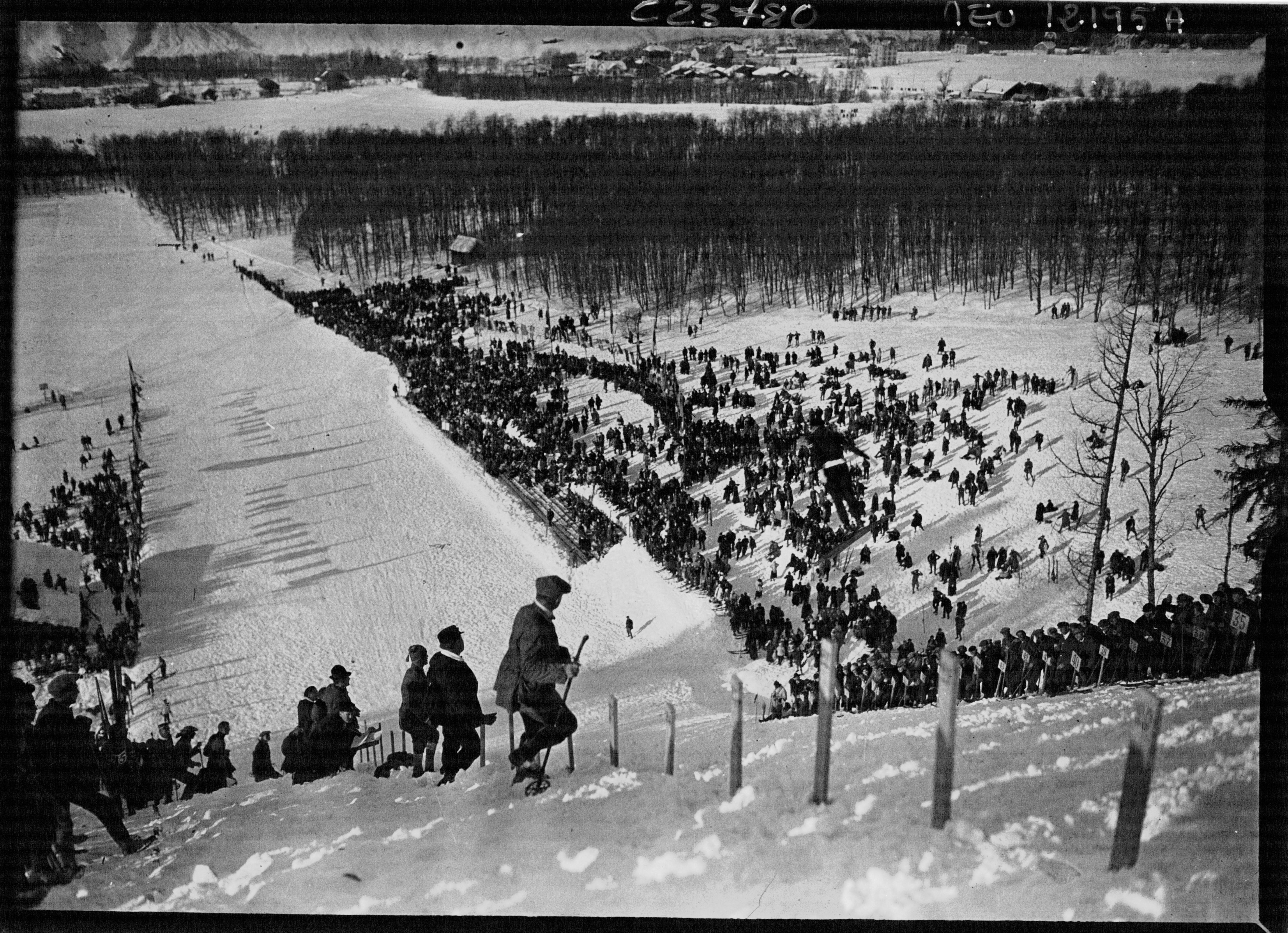 Chamonix 1924 : concours de saut : vue générale du tremplin, vue d'en haut.